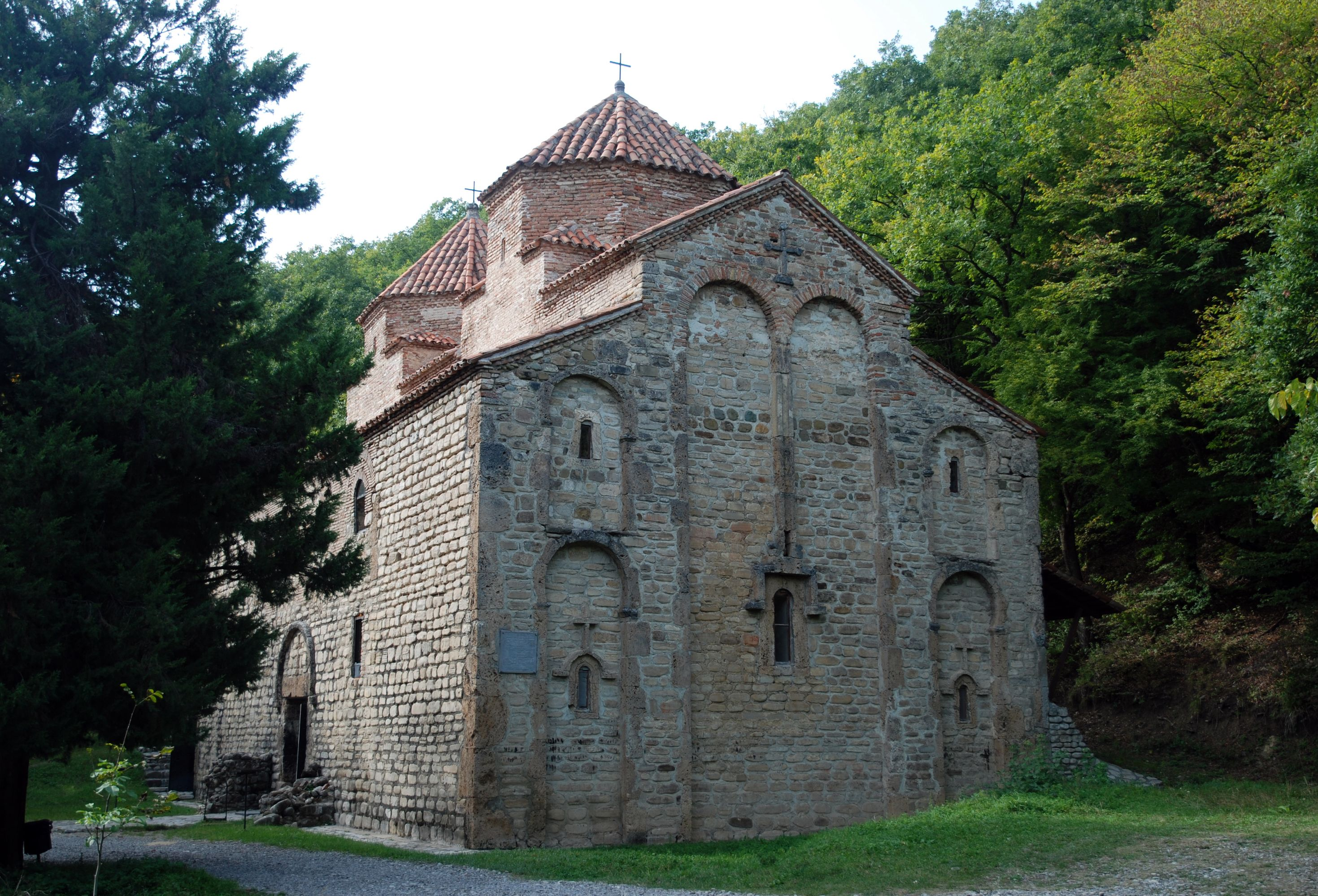 Gurjaani Kvelatsminda, east